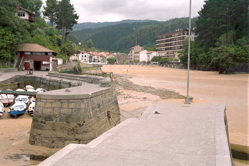 Vista de Ea (Vizcaya), (España), con la ría en bajamar. Tomada por JMSE el 6 de julio de 2003 y cedida a Wikipedia.